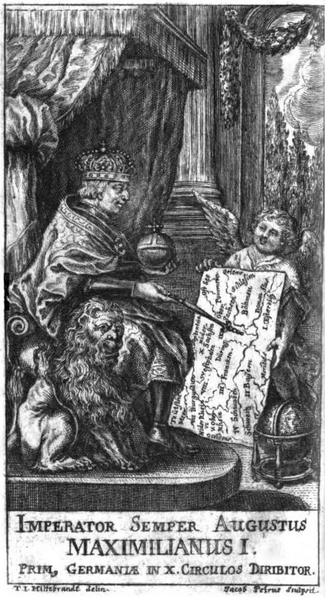 Imperator Semper Augustus Maximilianus I. prim, Germaniae in X. circulos diribitor, Titelkupfer zu: Johann Samuel Tromsdorff: Accurate neue und alte Geographie von ganz Teutschland, Frankfurt und Leipzig 1711